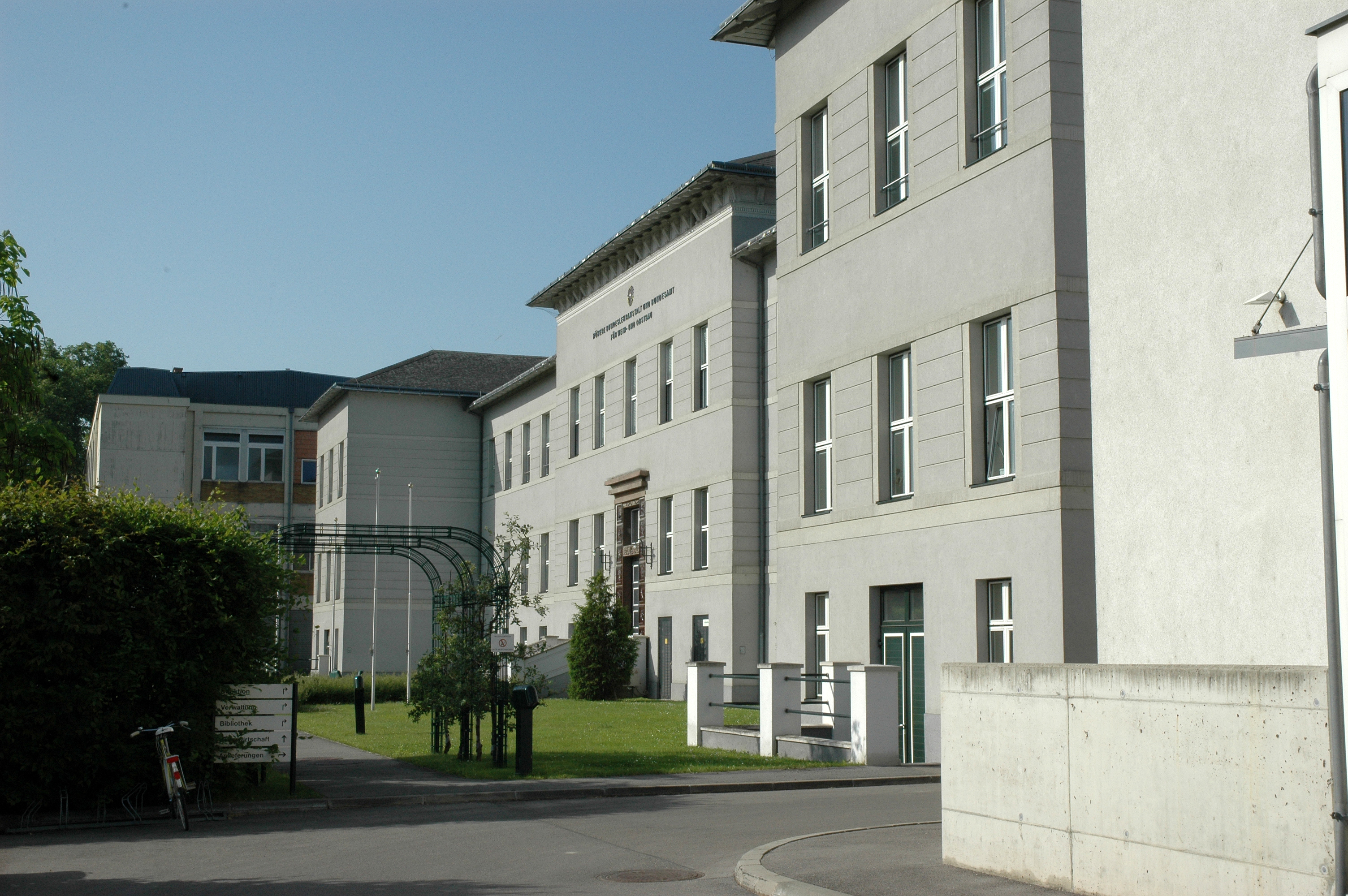 Hauptgebäude der Höheren Bundeslehr- und Versuchsanstalt für Wein- und Obstbau, Klosterneuburg, Österreich